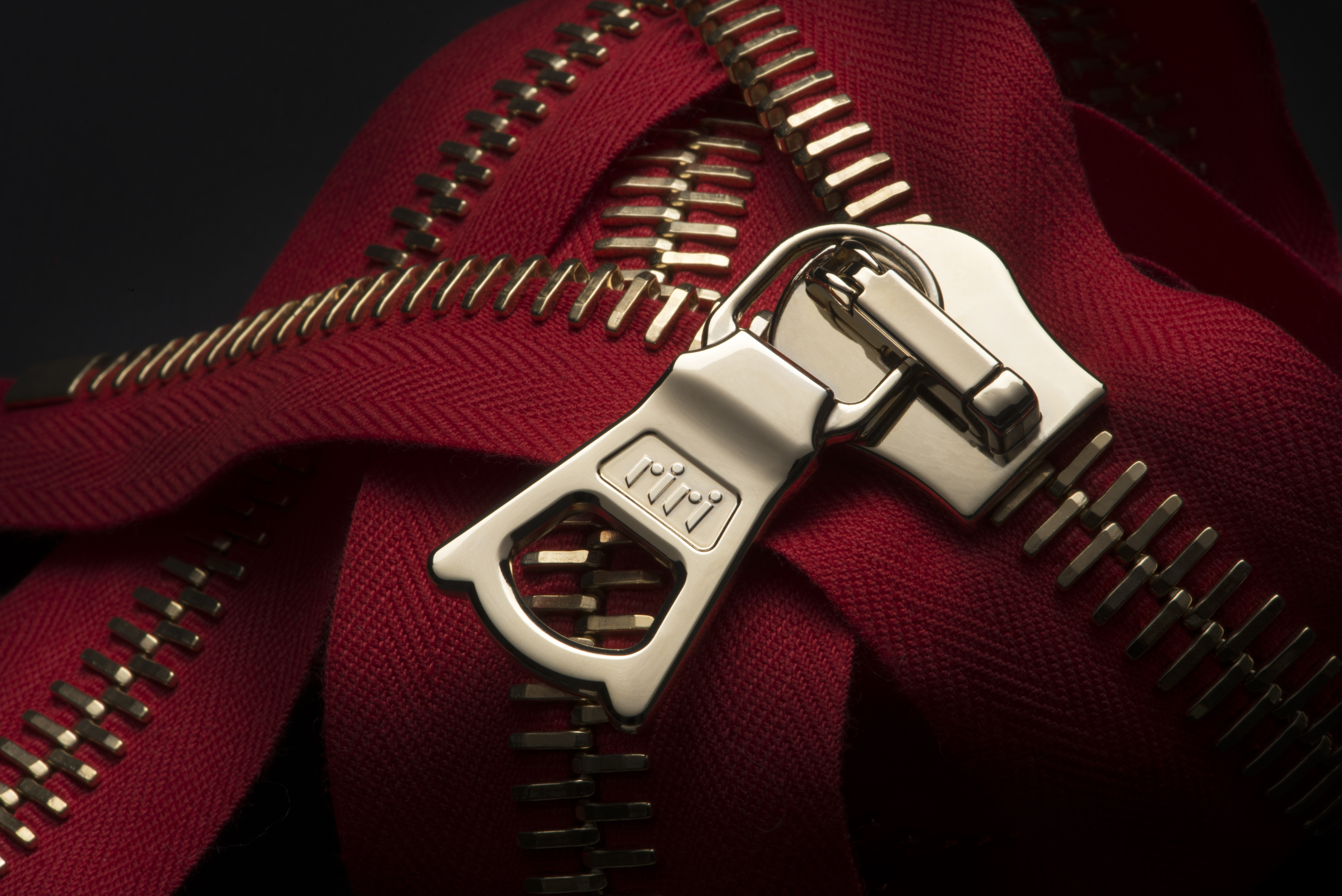 Riri, una storia di innovazioni, nate da un'intuizione geniale. L’eccellenza risplende nelle piccole componenti che hanno reso Riri l’azienda leader nell’industria degli accessori moda.